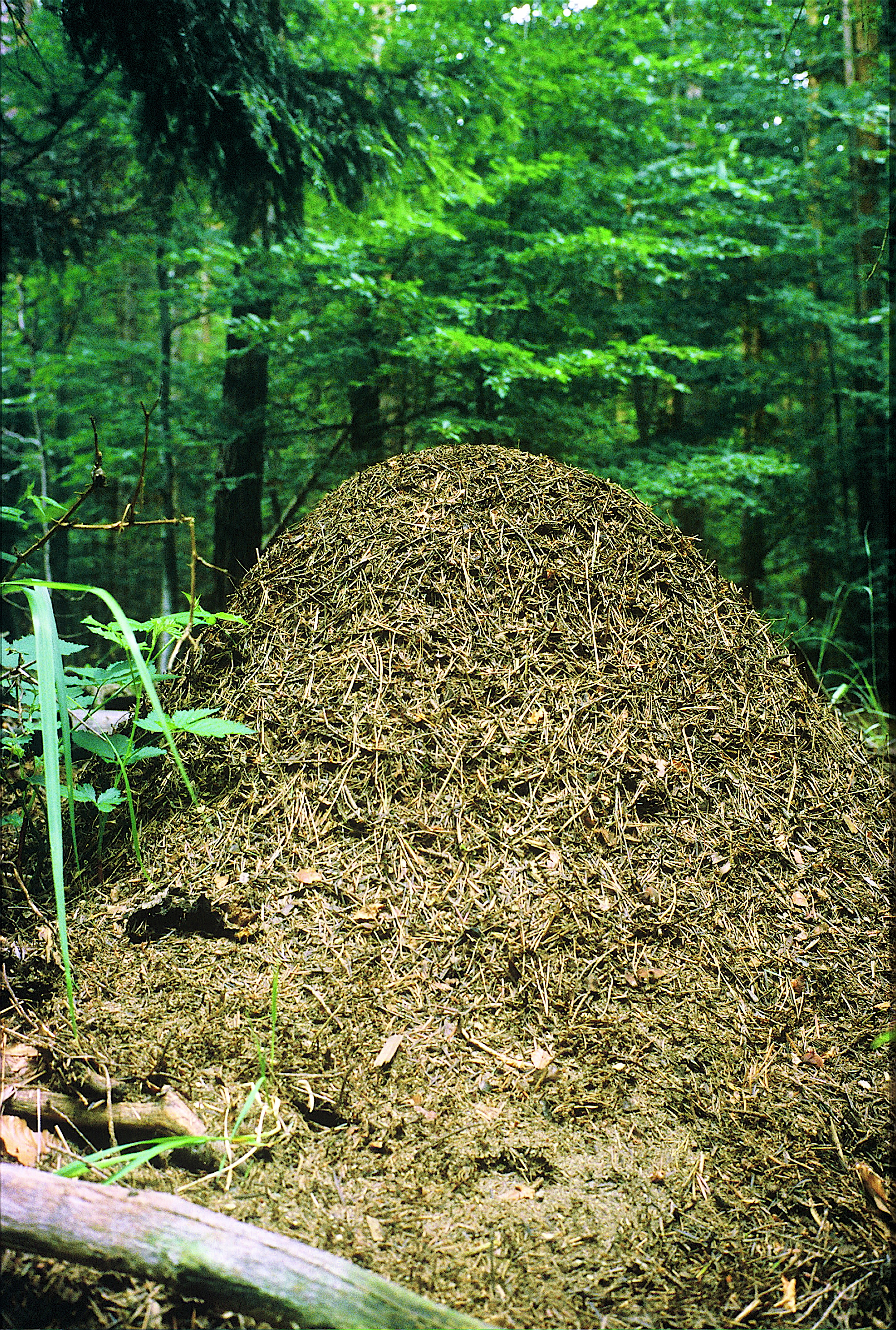 Imposanter Nesthügel der Gattung Formica